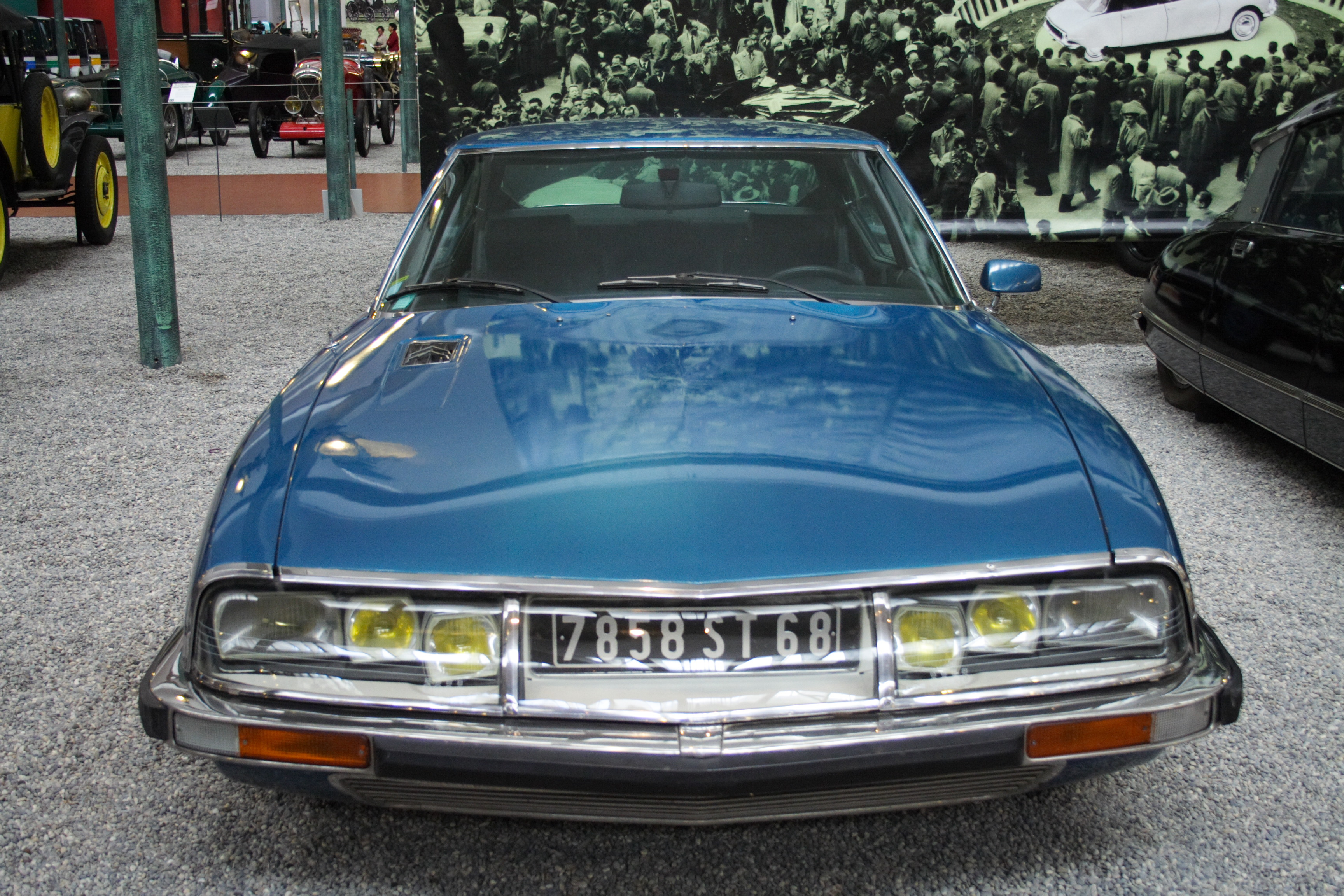 Citroen SM at the Musée National de l'Automobil(Mulhouse, France)